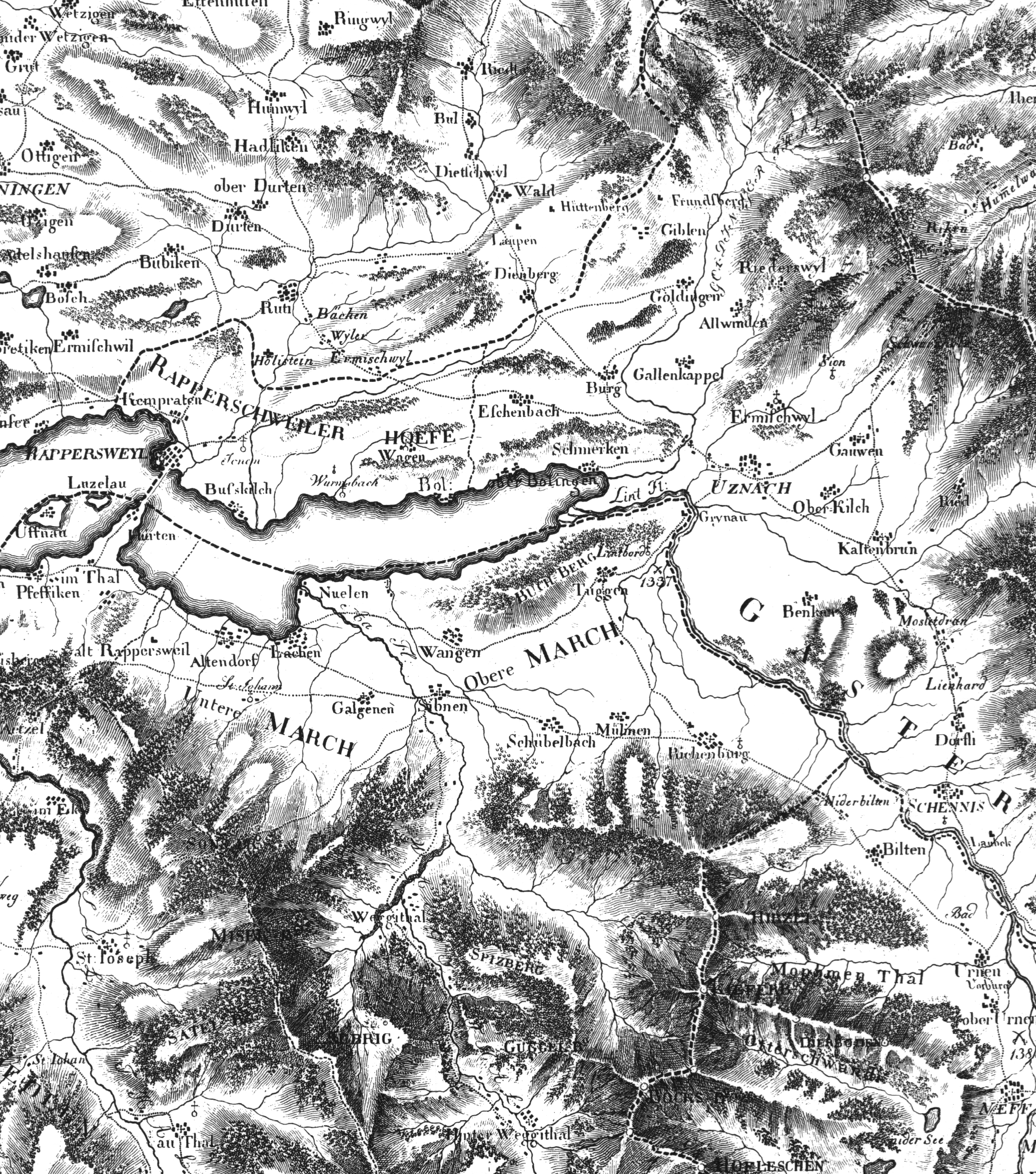 Die Grafschaft Uznach und die Herrschaft Rapperswil. Ausschnitt Atlas Suisse (Meyer-Weiss-Atlas) Blatt 7 (Partie du Canton de Lucerne d' Unterwalden d' Uri et Zurich le Canton Glarus Schweiz et Zug) 1802, Massstab 1:120.000.